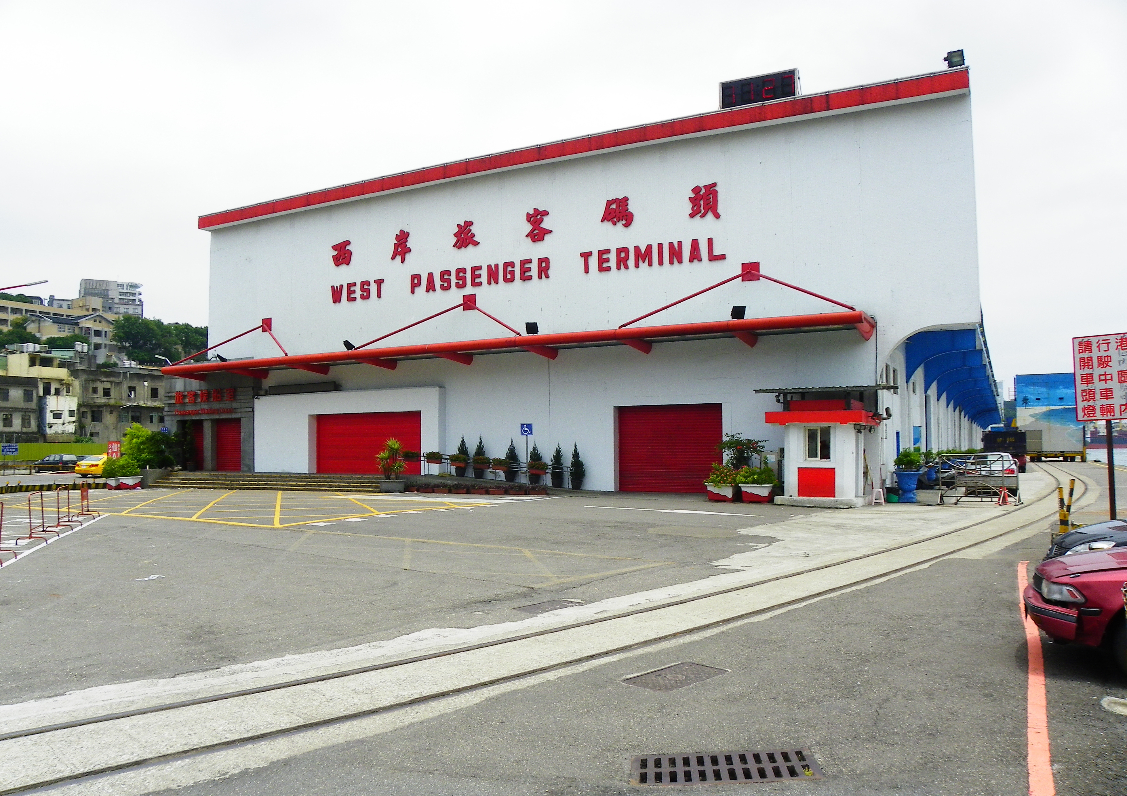 基隆港西岸旅客碼頭，地址：基隆市仁愛區港西街16號。